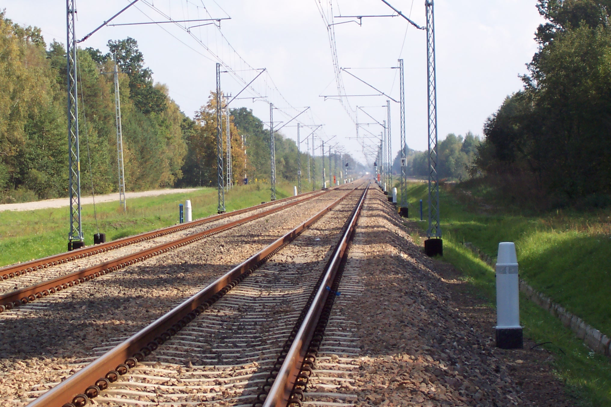 Urządzanie do odstraszania zwierząt UOZ-1 wprowadzane przez PKP